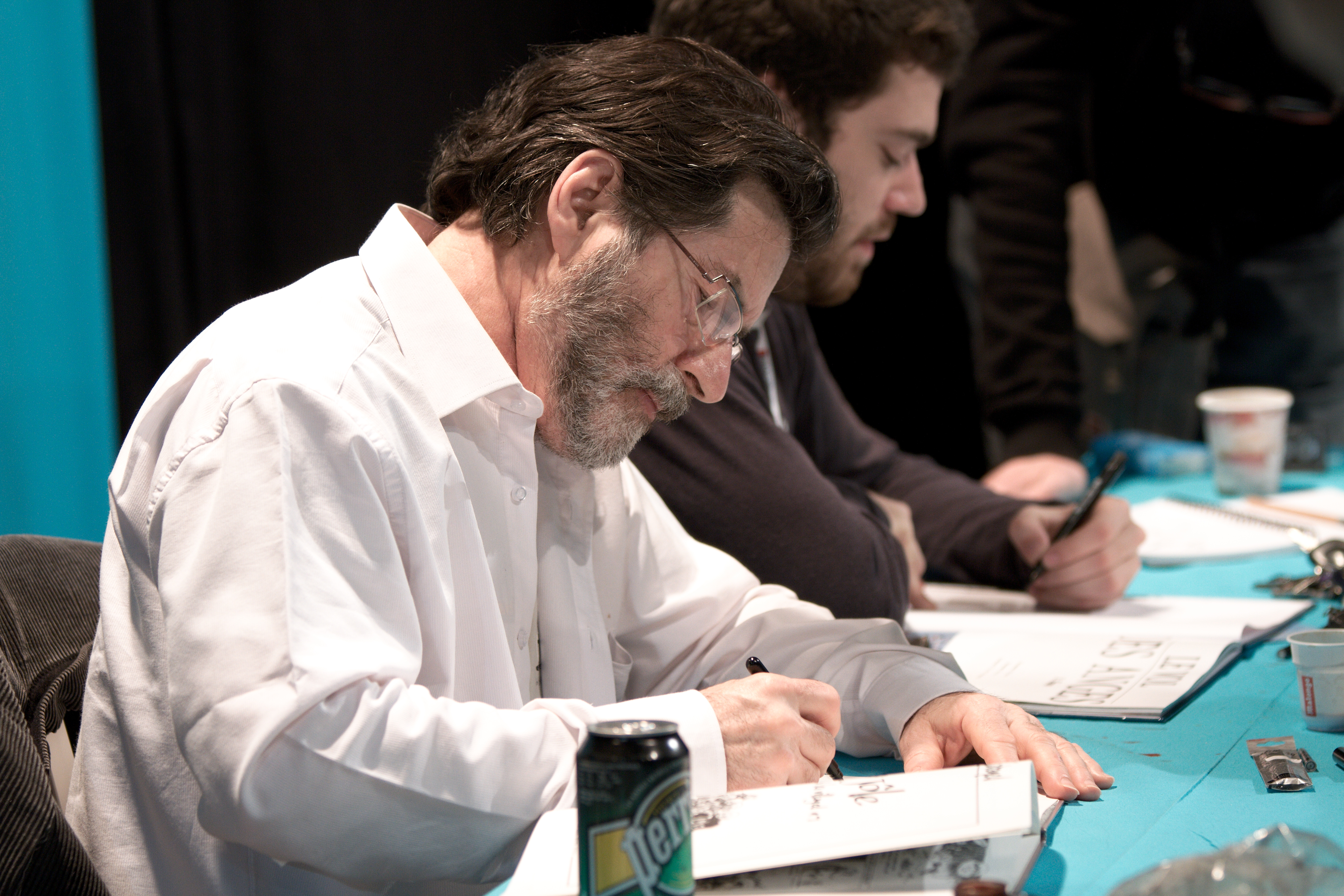 Max Cabanes lors du Festival de la bande dessinée d'Aix-en-Provence.